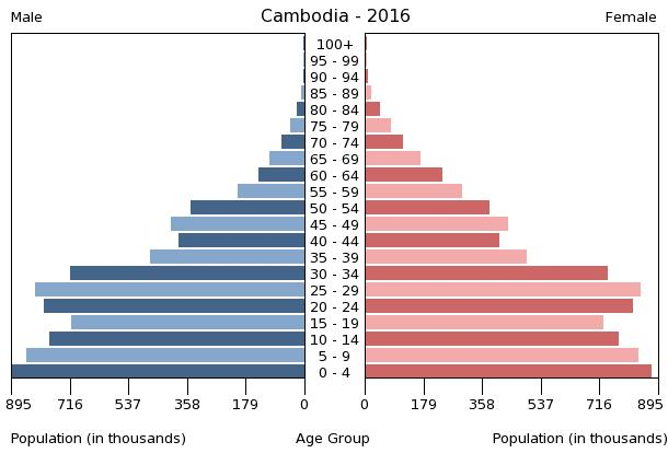 A population pyramid illustrates the age and sex structure of a country's population and may provide insights about political and social stability, as well as economic development. The population is distributed along the horizontal axis, with males shown on the left and females on the right. The male and female populations are broken down into 5-year age groups represented as horizontal bars along the vertical axis, with the youngest age groups at the bottom and the oldest at the top. The shape of the population pyramid gradually evolves over time based on fertility, mortality, and international migration trends.